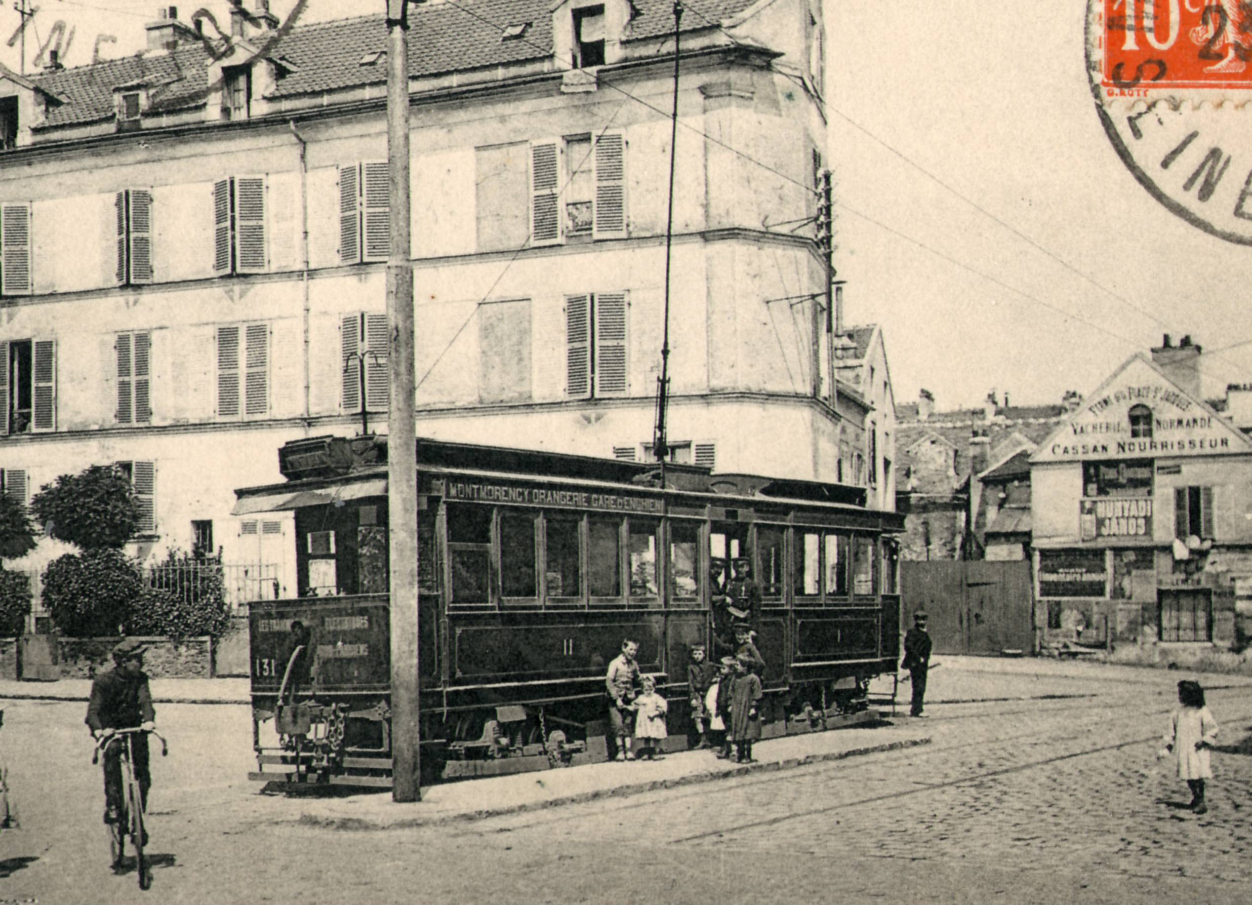 Détail d'une carte postale ancienne éditée par ND N°237 MONTMORENCY - La Place Saint-Jacques et le Terminus des Tramways